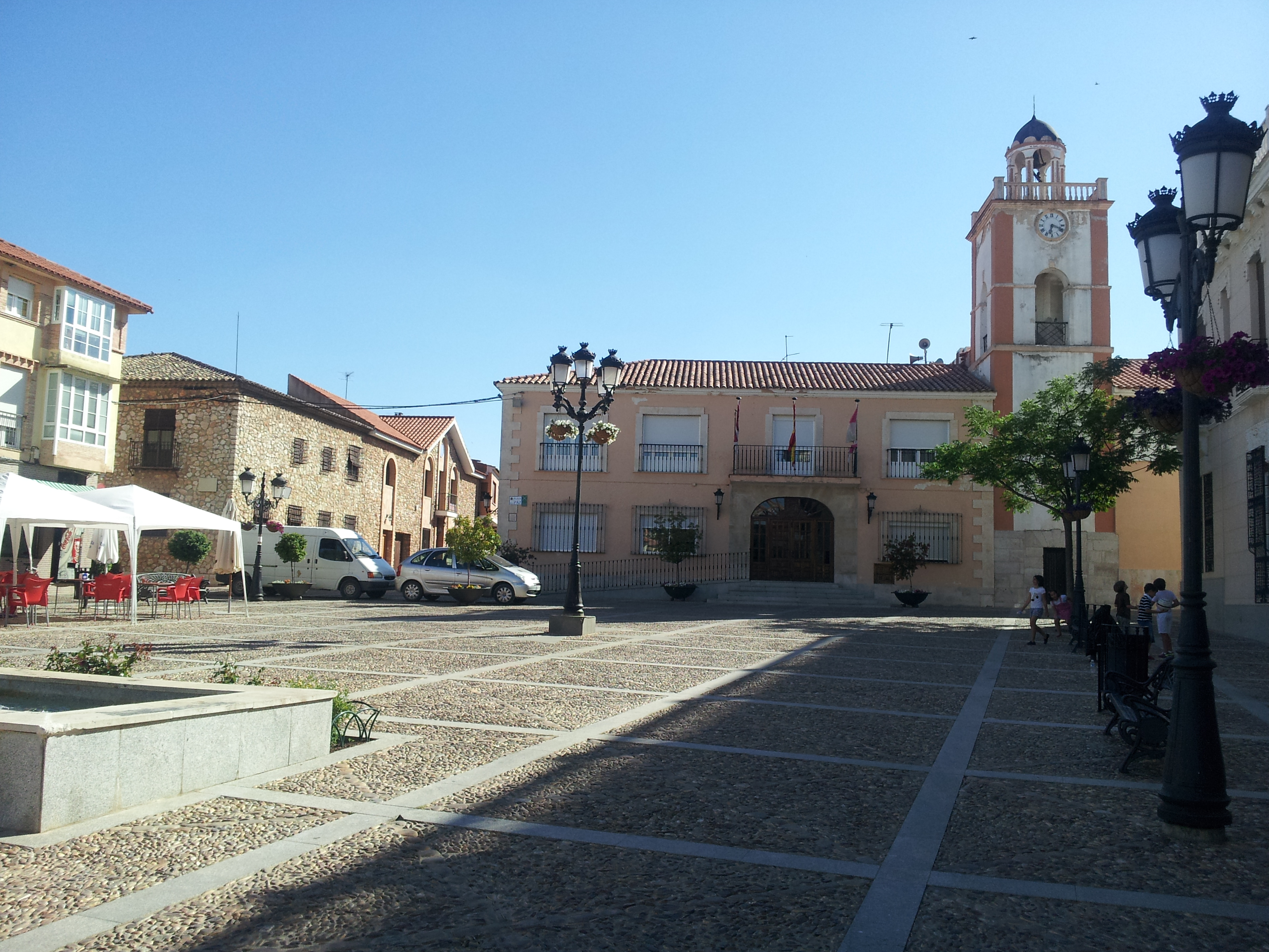 Plaza de la Paz, torre del réloj y ayuntamiento de Villarta de San Juan